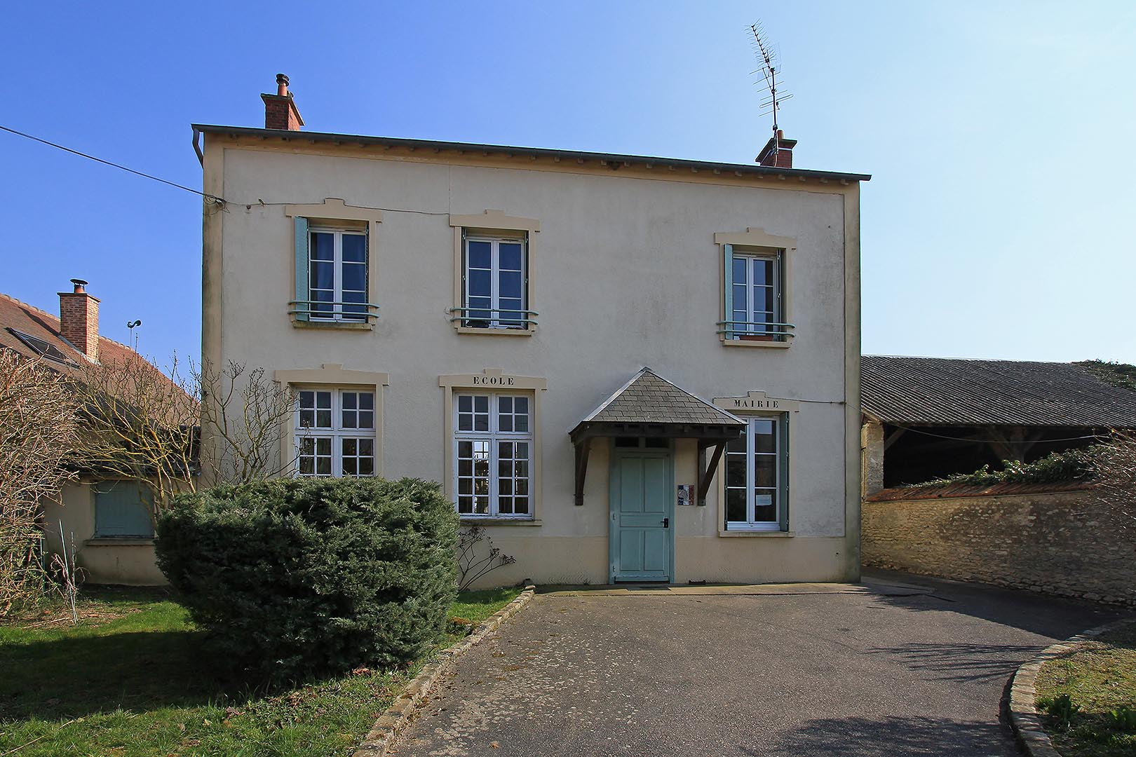 Mairie et école de Bois-Herpin